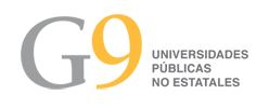 Logo de la Red Universitaria G9